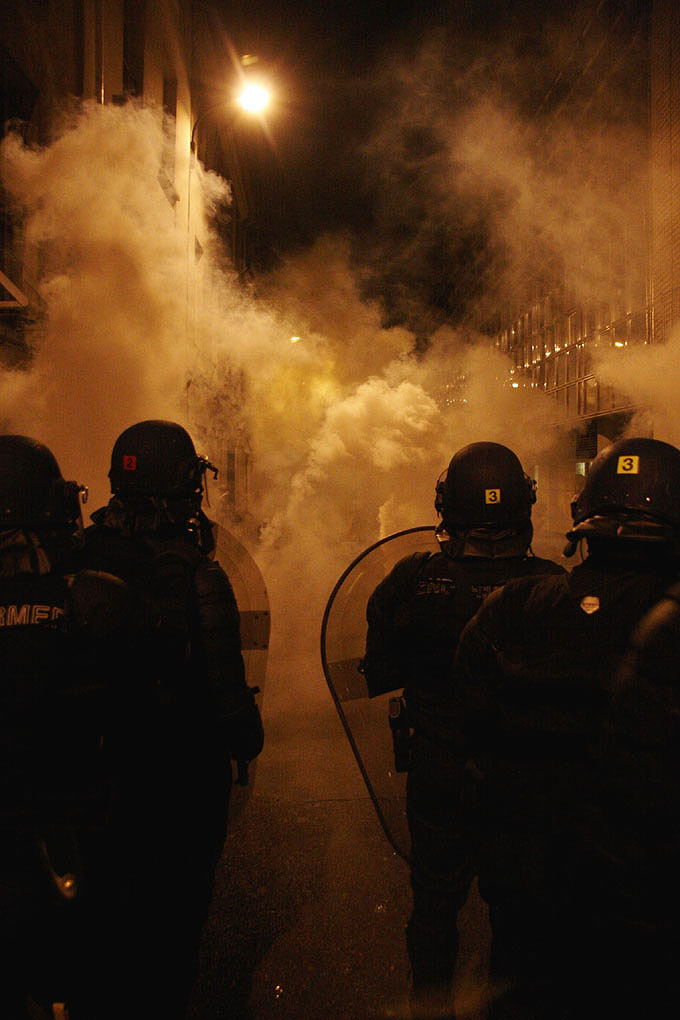 Bastille 2007-05-06 anti Sarkozy 487645695 abe4befd12 oFlickr